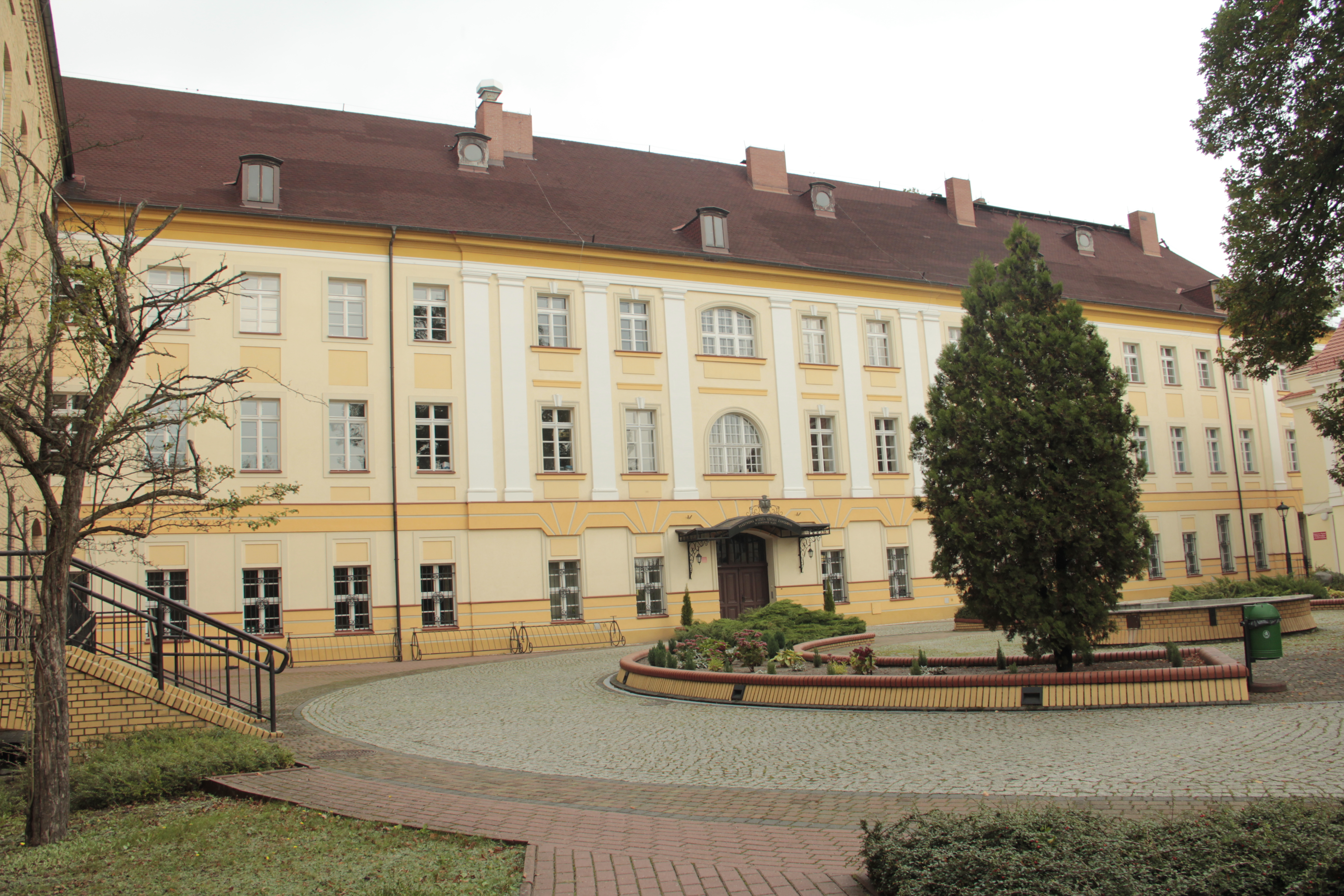 Gorzów Wielkopolski, Dom Ubogich, 1799-1801, XX